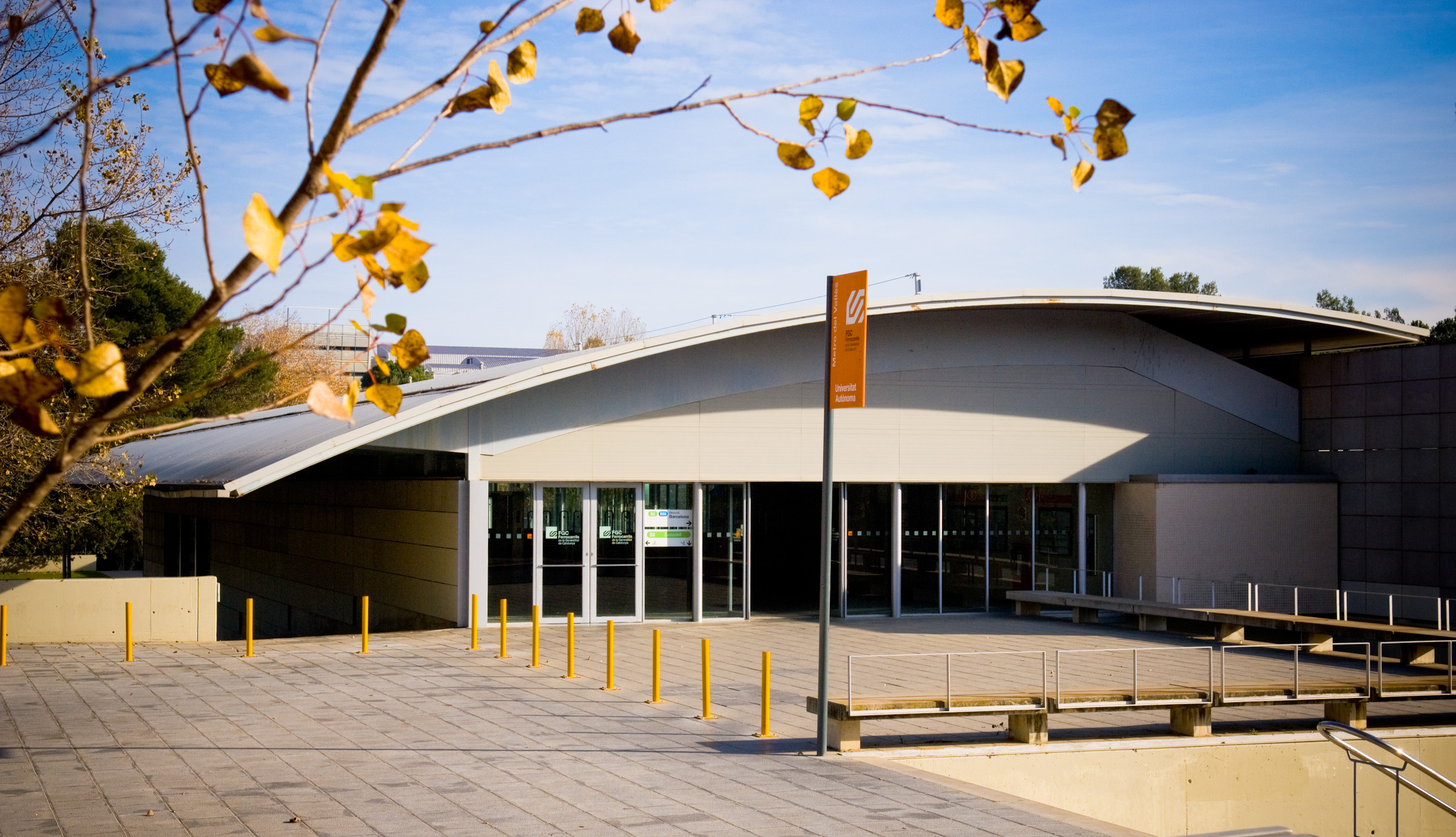 Estació ferrocarrils de la Generalitat de Catalunya a la Universitat Autònoma (Cerdanyola del Vallès).